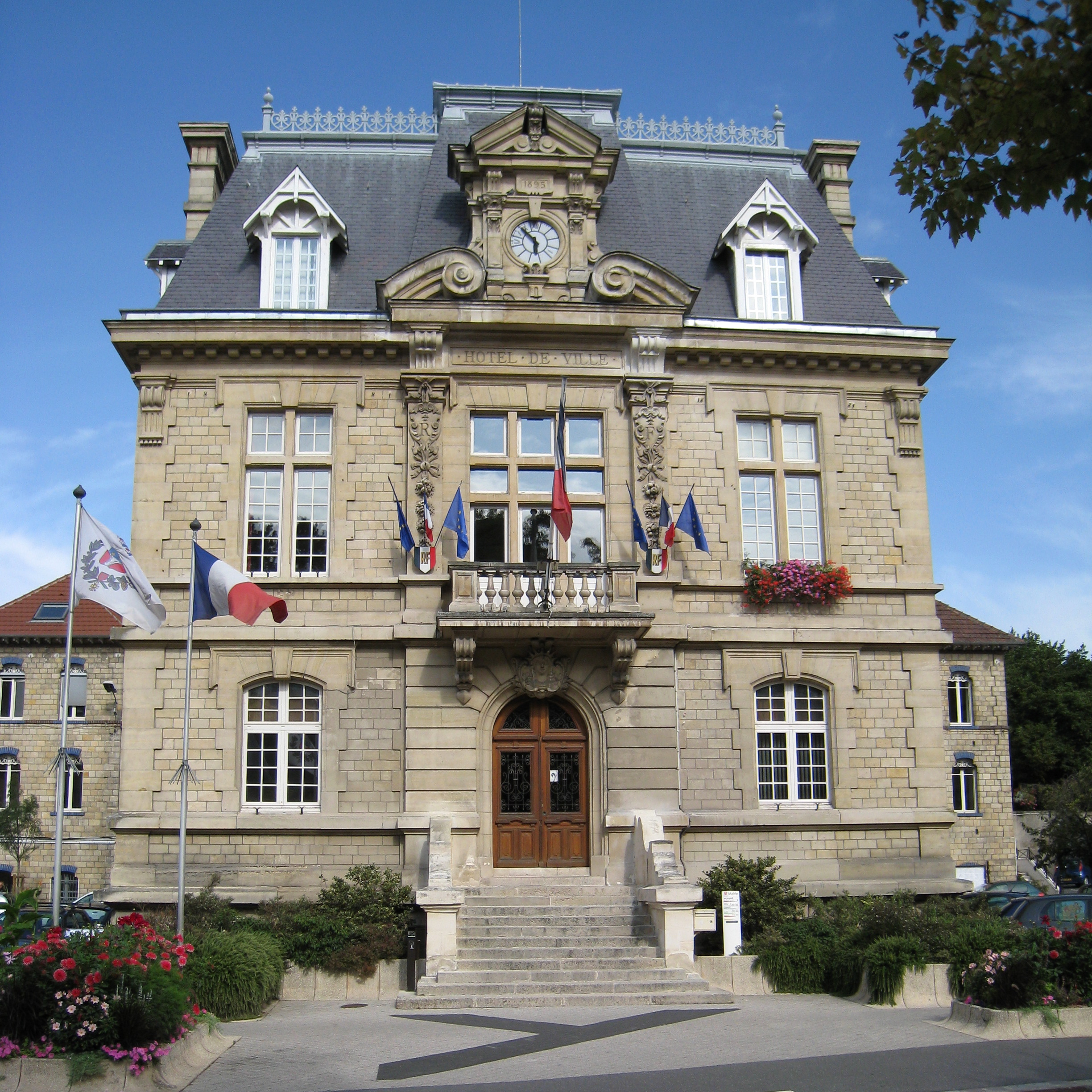 Mairie de Conflans Sainte-Honorine, Yvelines, France